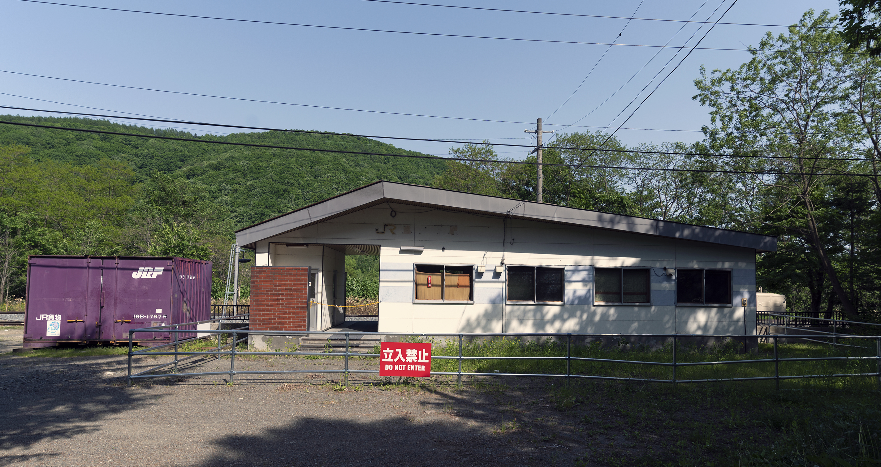 北海道旅客鉄道株式会社根室本線島ノ下信号場（旧島ノ下駅） 駅舎跡地